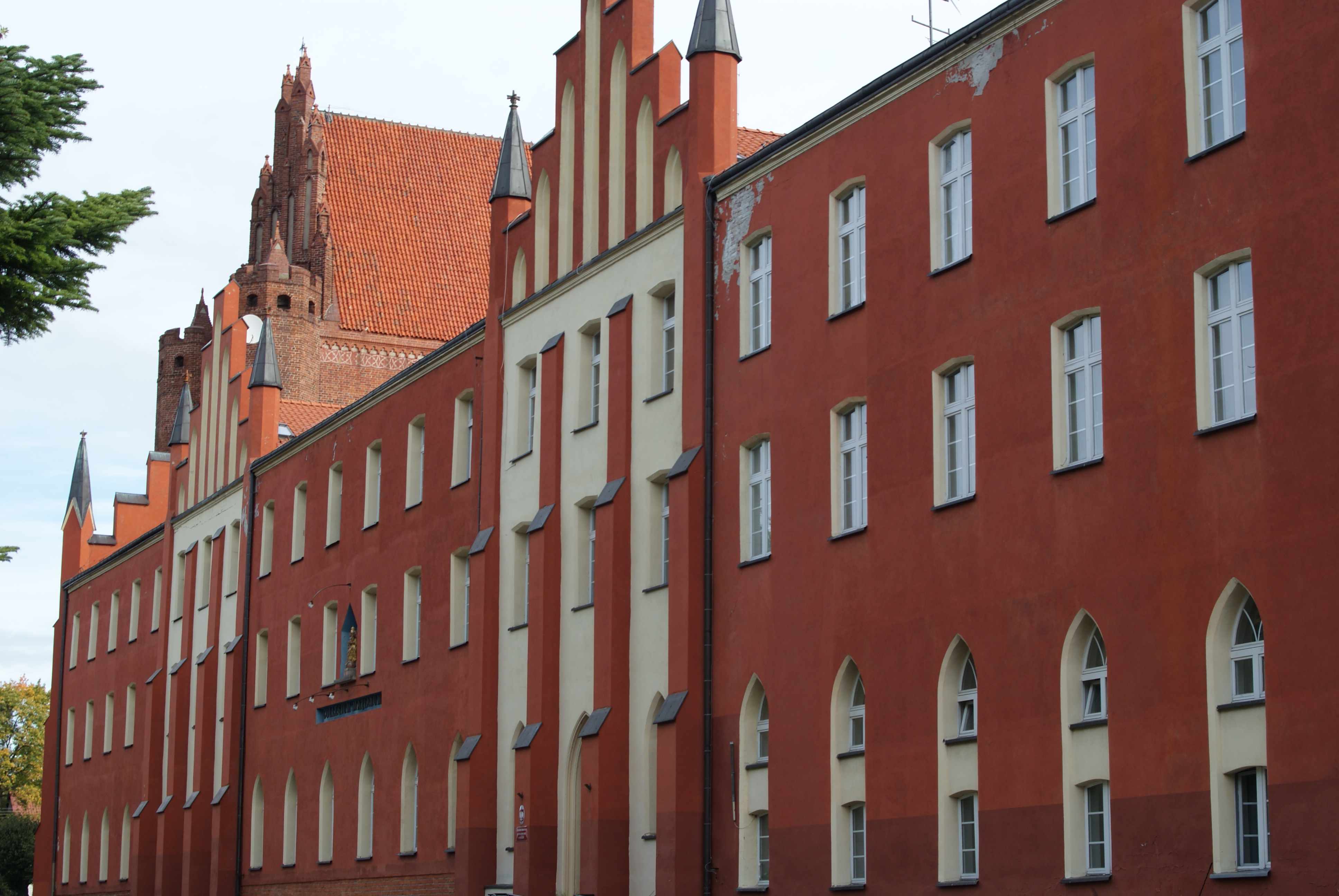 Pelplin, pl. Mariacki 7 / al. Cystersów - collegium Marianum, obecnie dom opieki społecznej, XIX